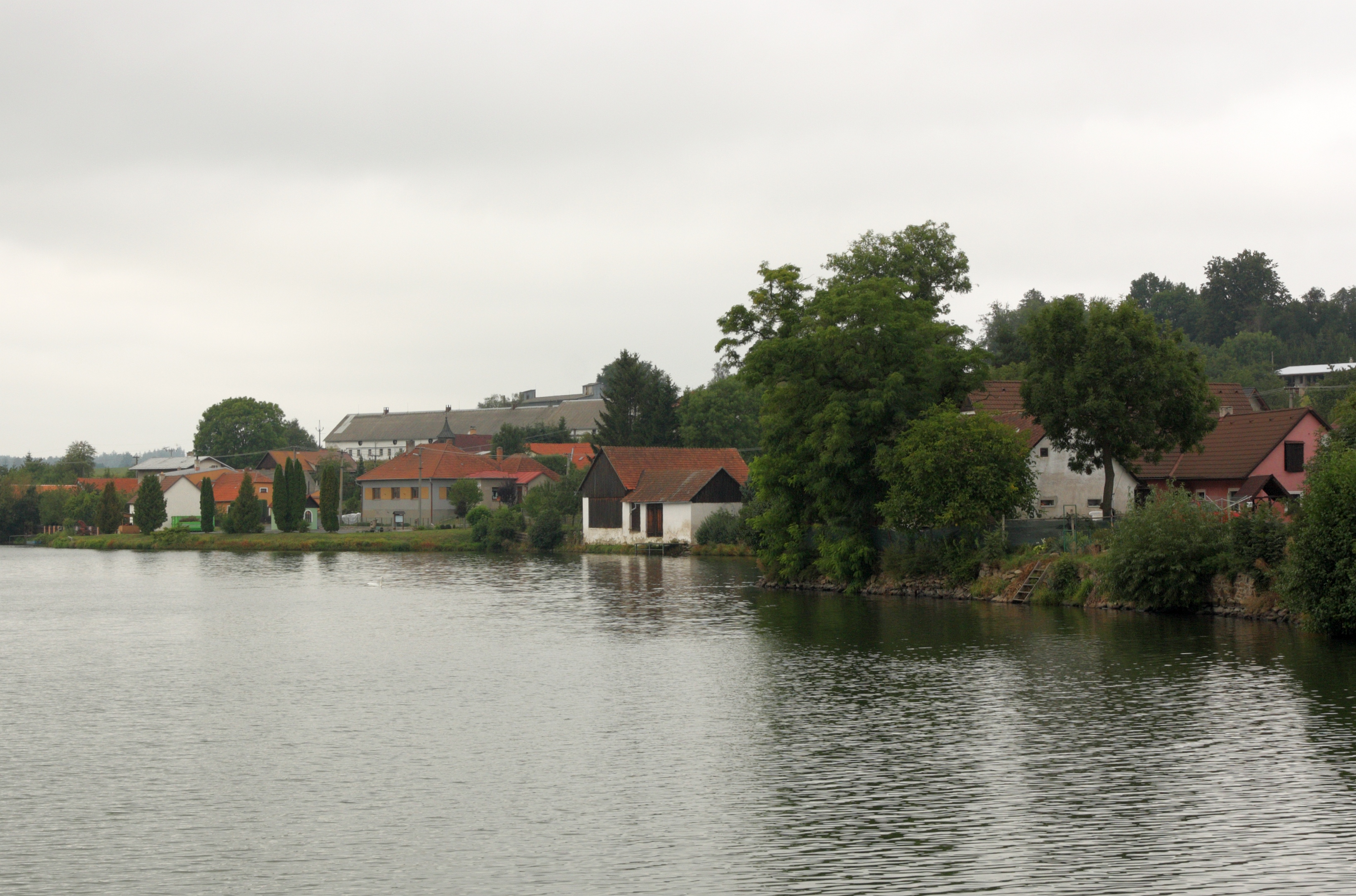 Dolní Libochová - pohled přes rybník